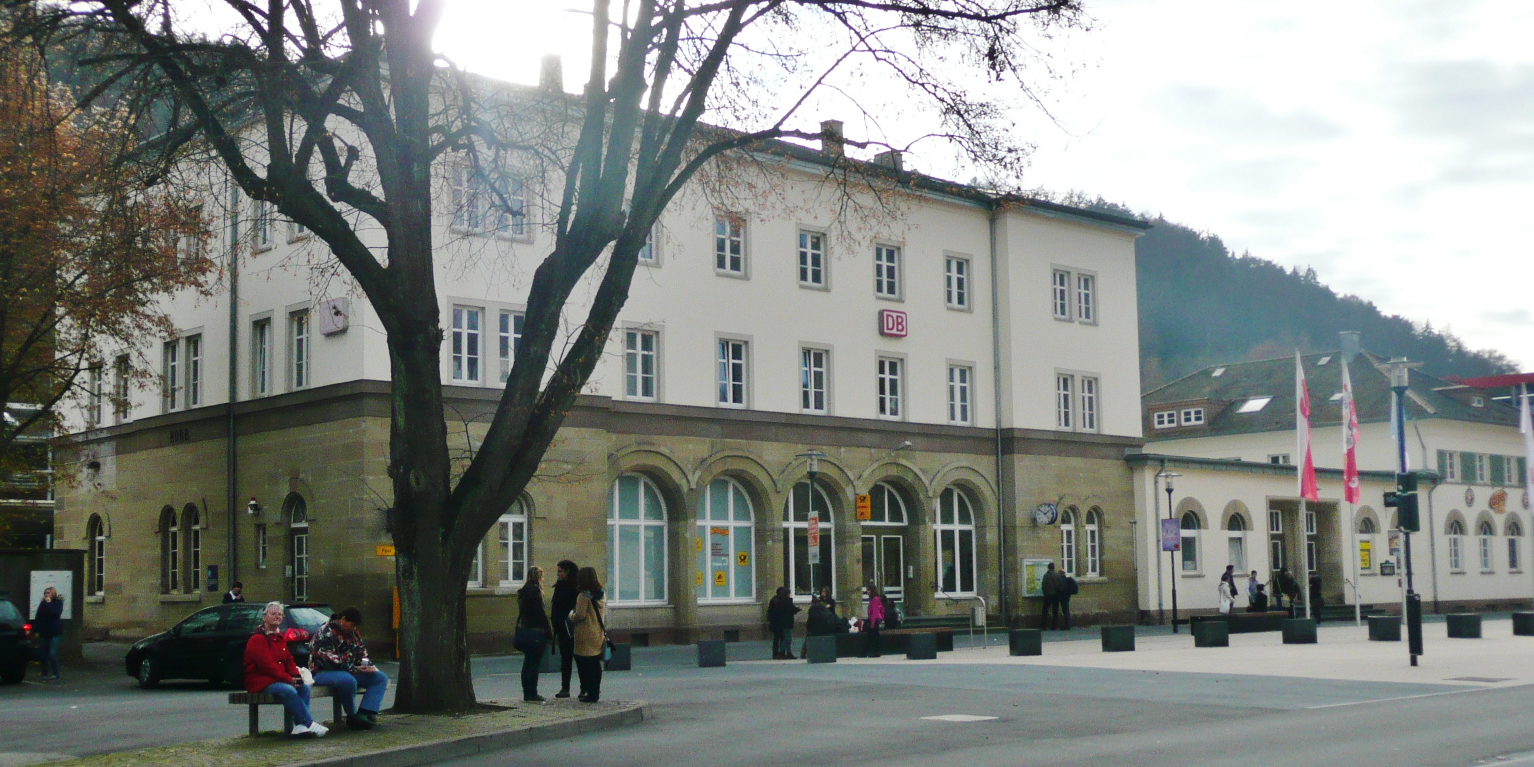 Beim 366 km langen Neckartalradweg: Der Bahnhof in Horb am Neckar